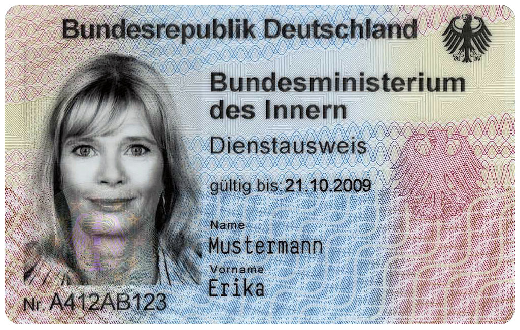 Elektronischer Dienstausweis für deutsche Bundesbehörden (eDA), Dienstausweis Bundesministeriums des Innern (BMI), Vorderseite